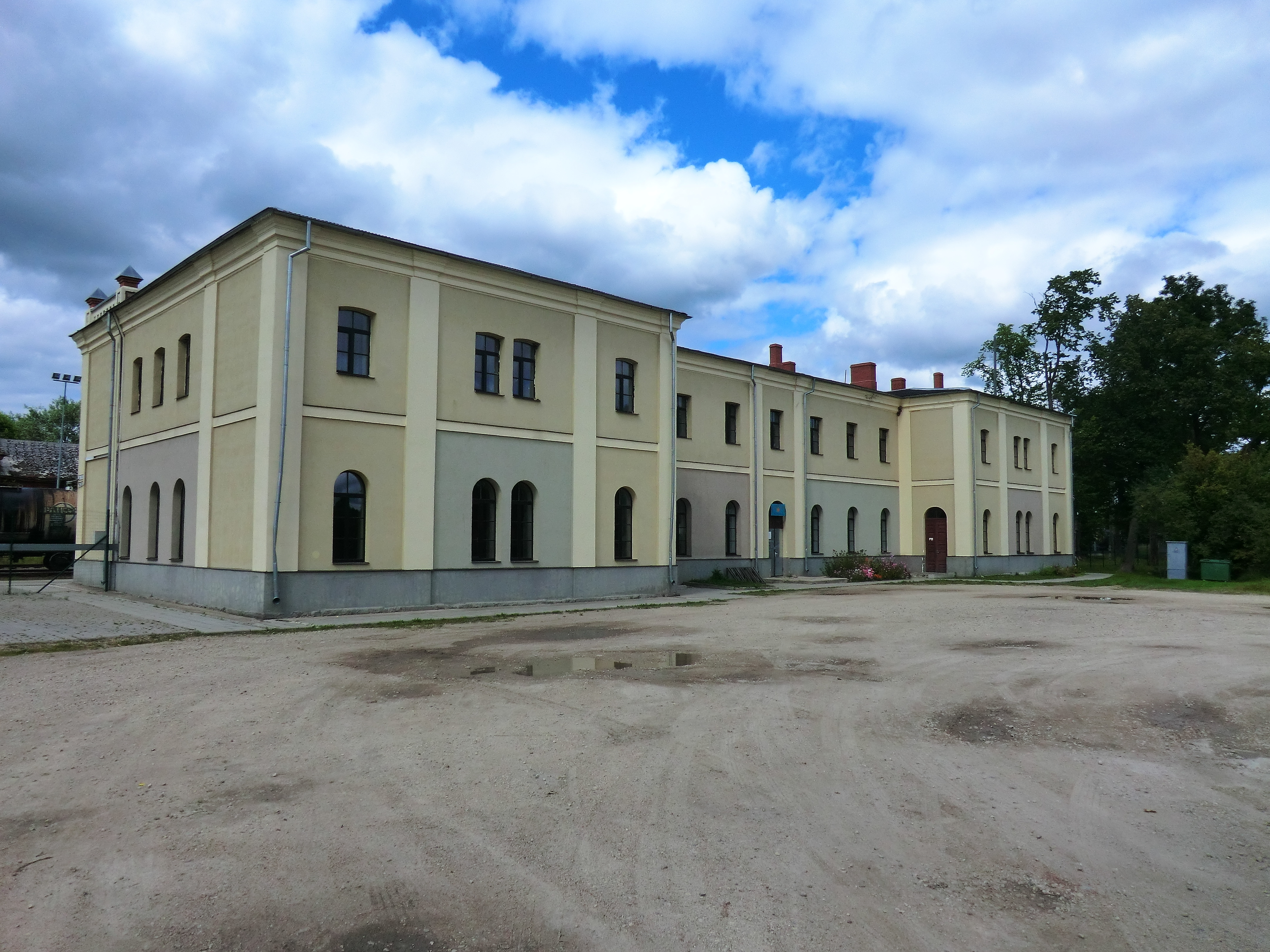 Kārsavas stacijas ēka